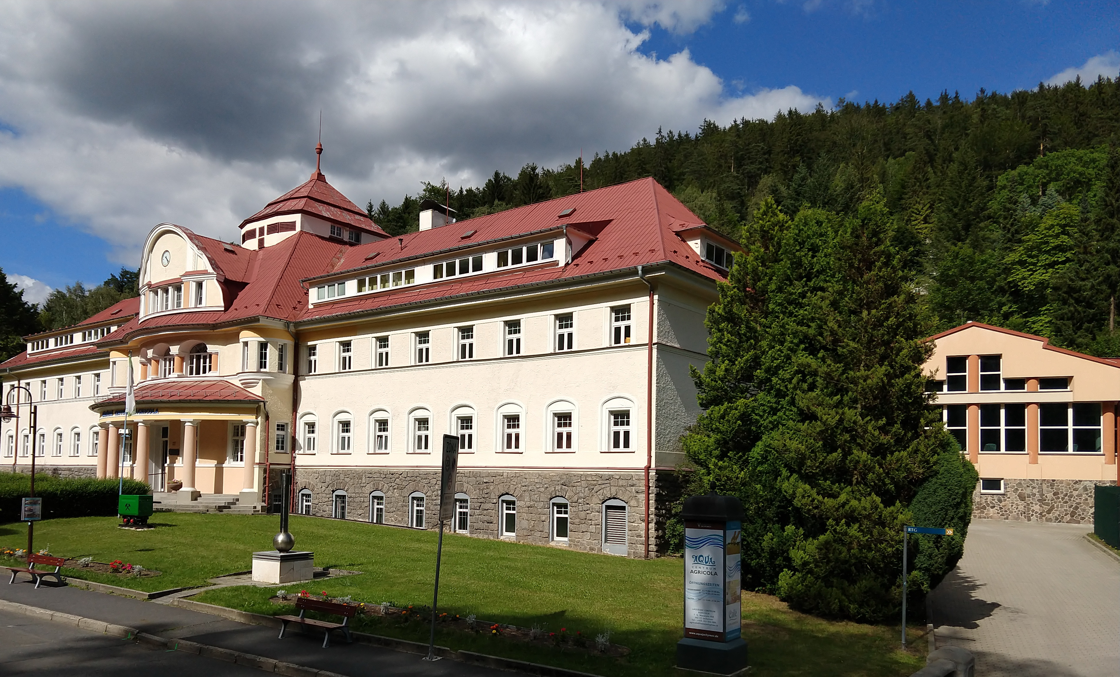 Aquacentrum Agricola, Jáchymov.